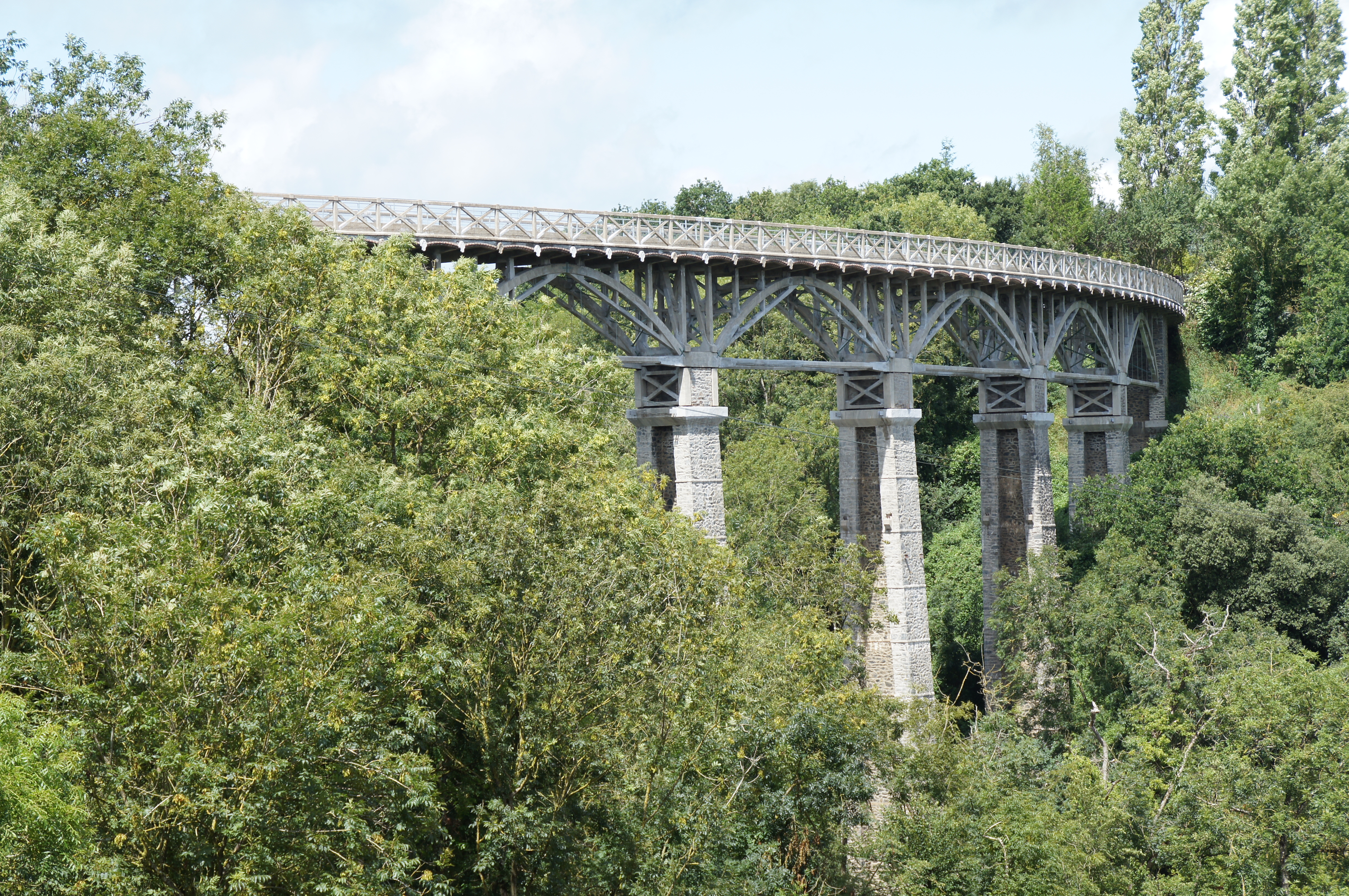 Viadukt von Ponts-Neufs